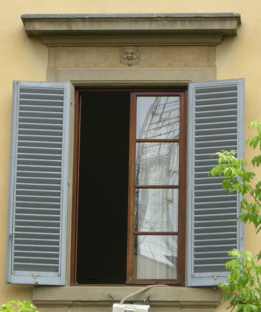 Casino di san marco, finestra con mascherone